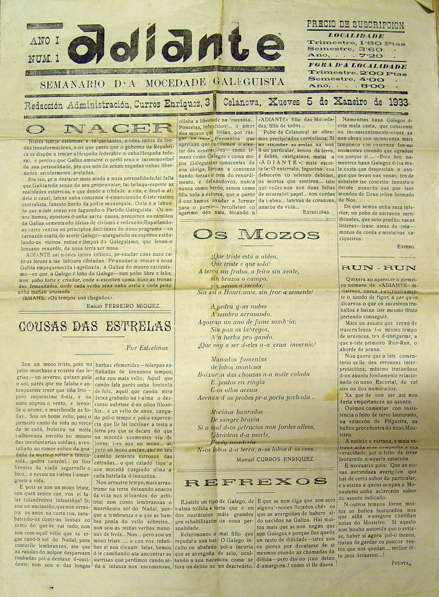 Adiante n.º 1, 5 de xaneiro de 1933.